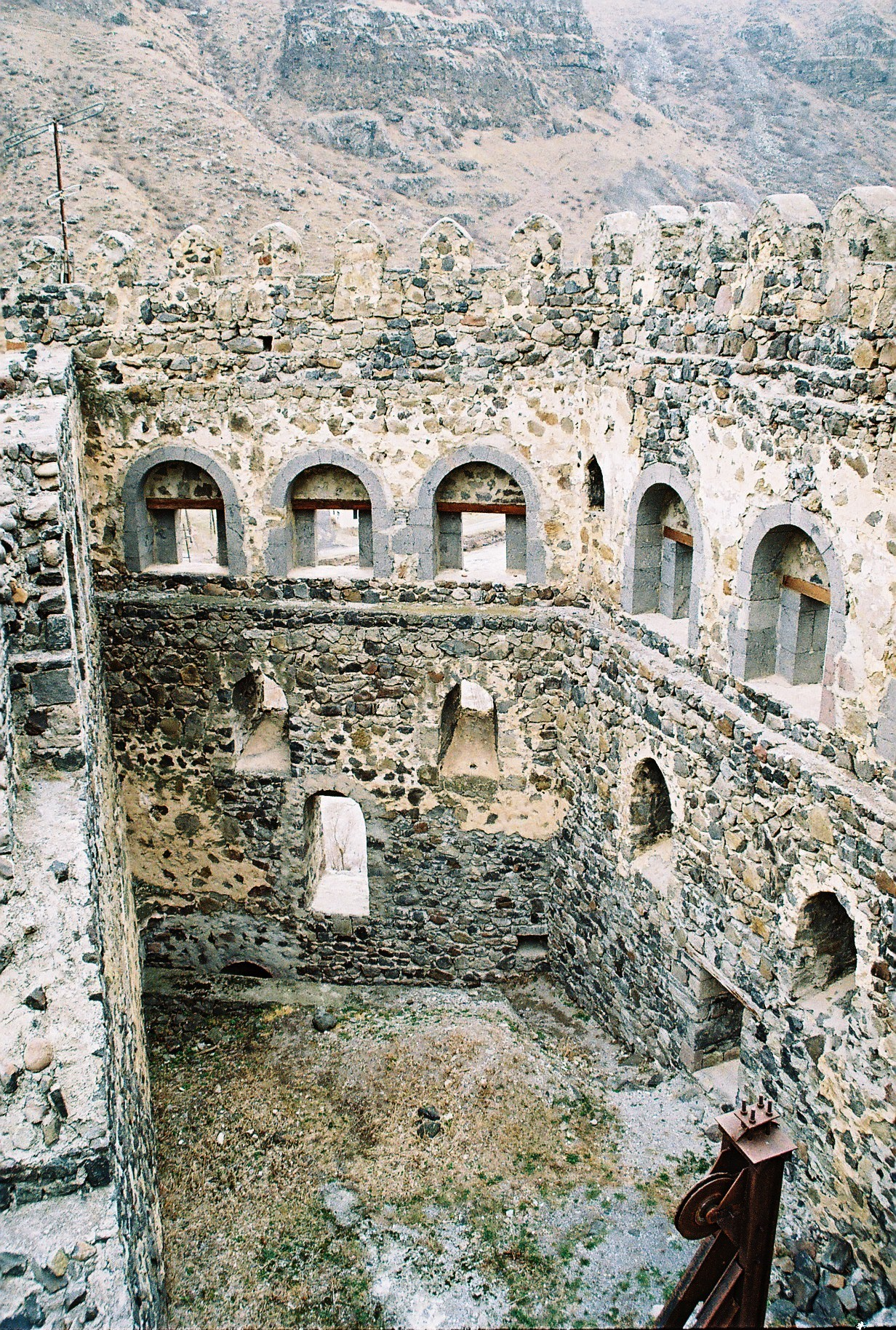 ხერთვისი ციხე